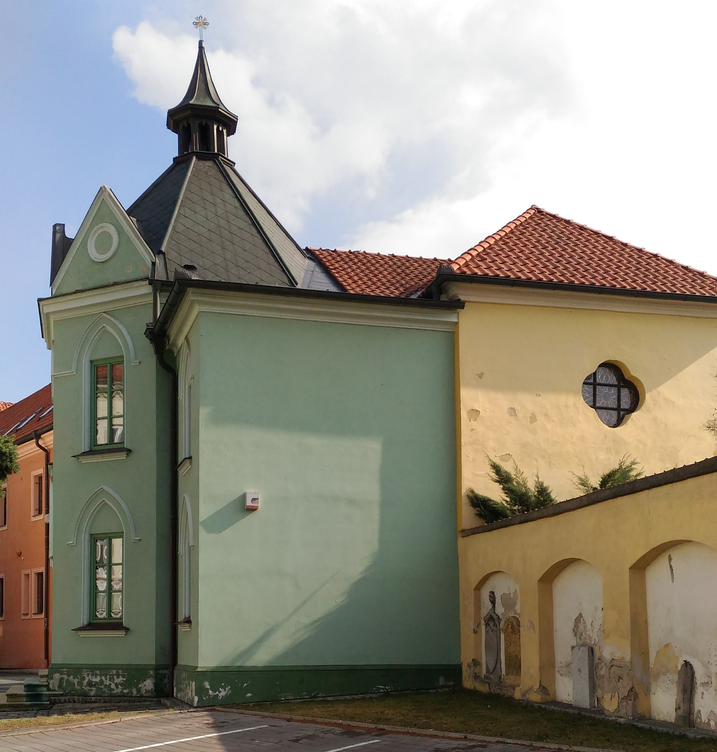 Lihovar - octárna, Tovačovského 318/18, Kroměříž.